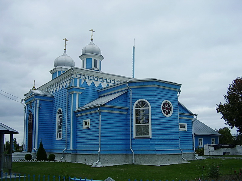 Жабінка. Свята-Пакроўская царква